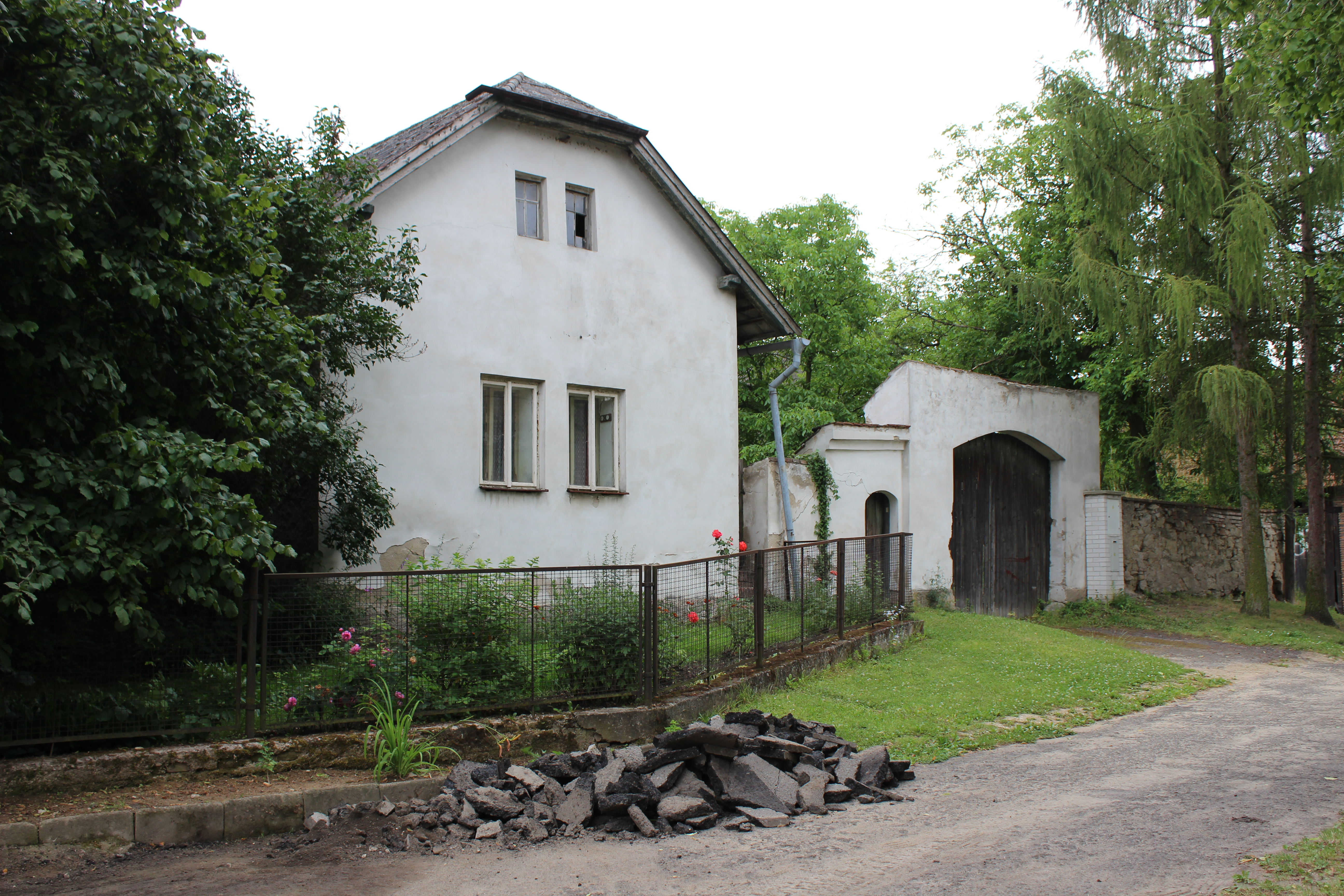 Dům číslo popisné 32 v Kochánkách.